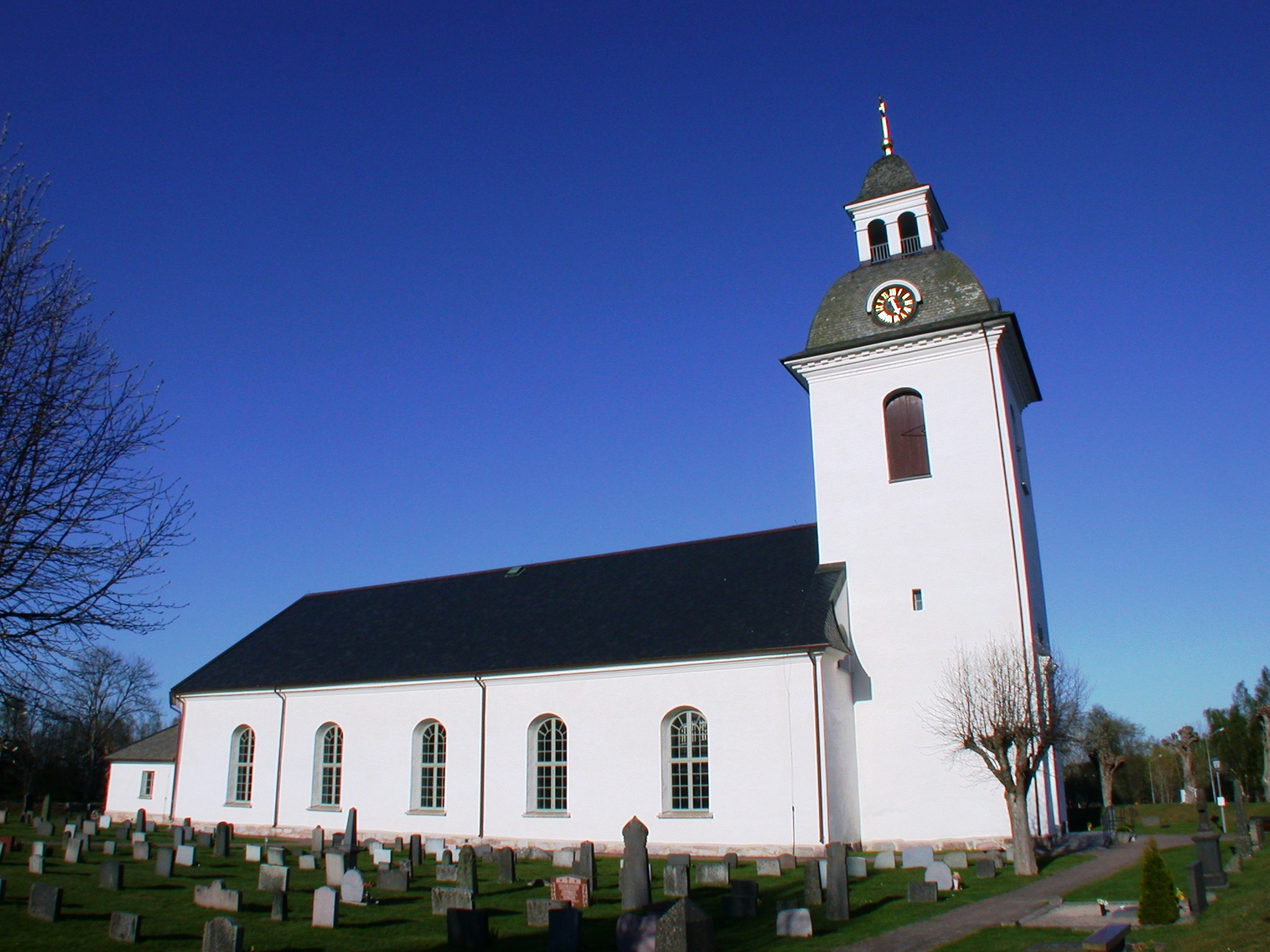 Älghult church, Uppvidinge, Sweden